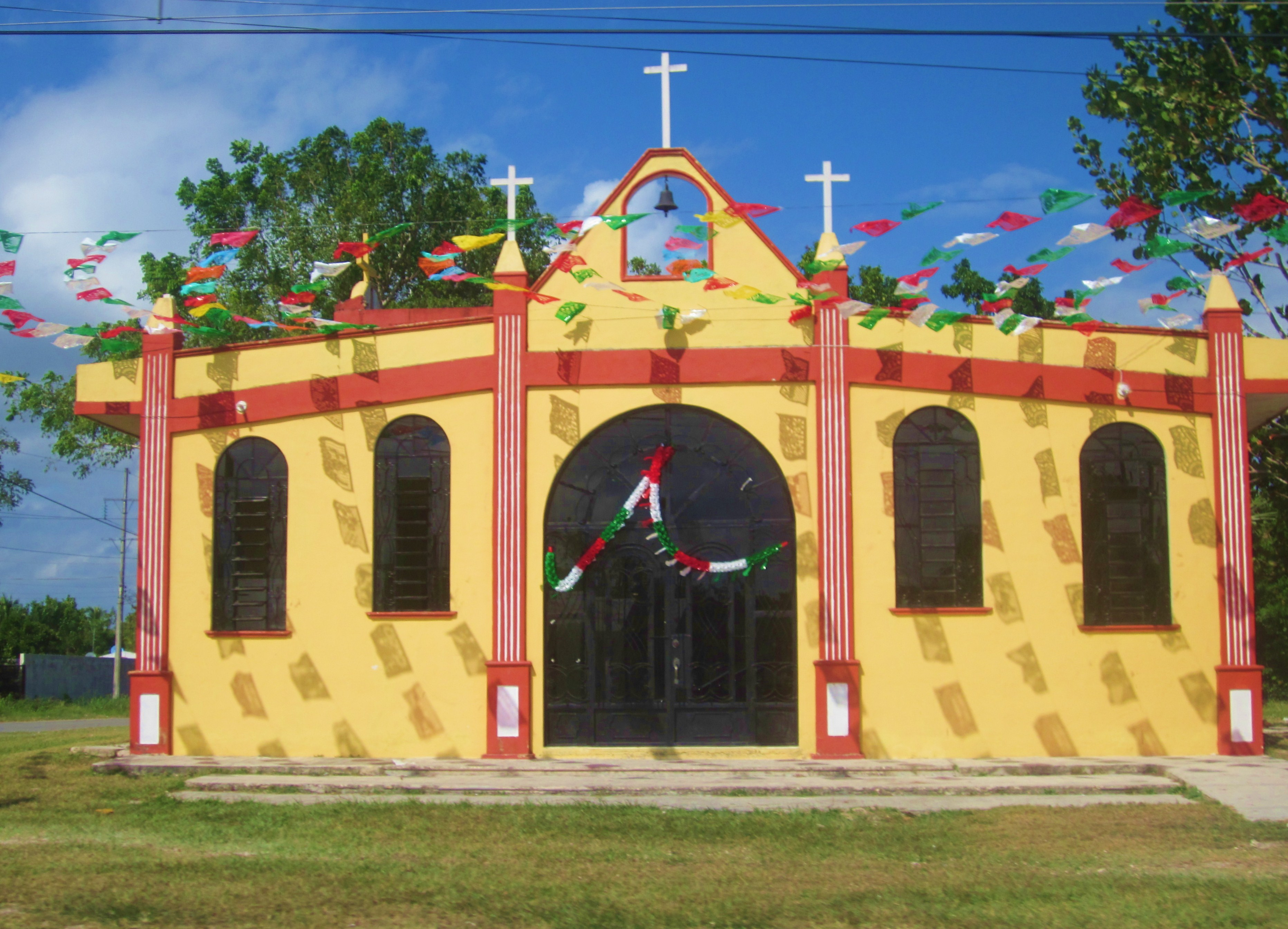 Iglesia en Subteniente López, Quintana Roo.